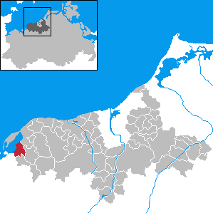 Am Salzhaff in Mecklenburg-Western Pomerania - District Bad Doberan